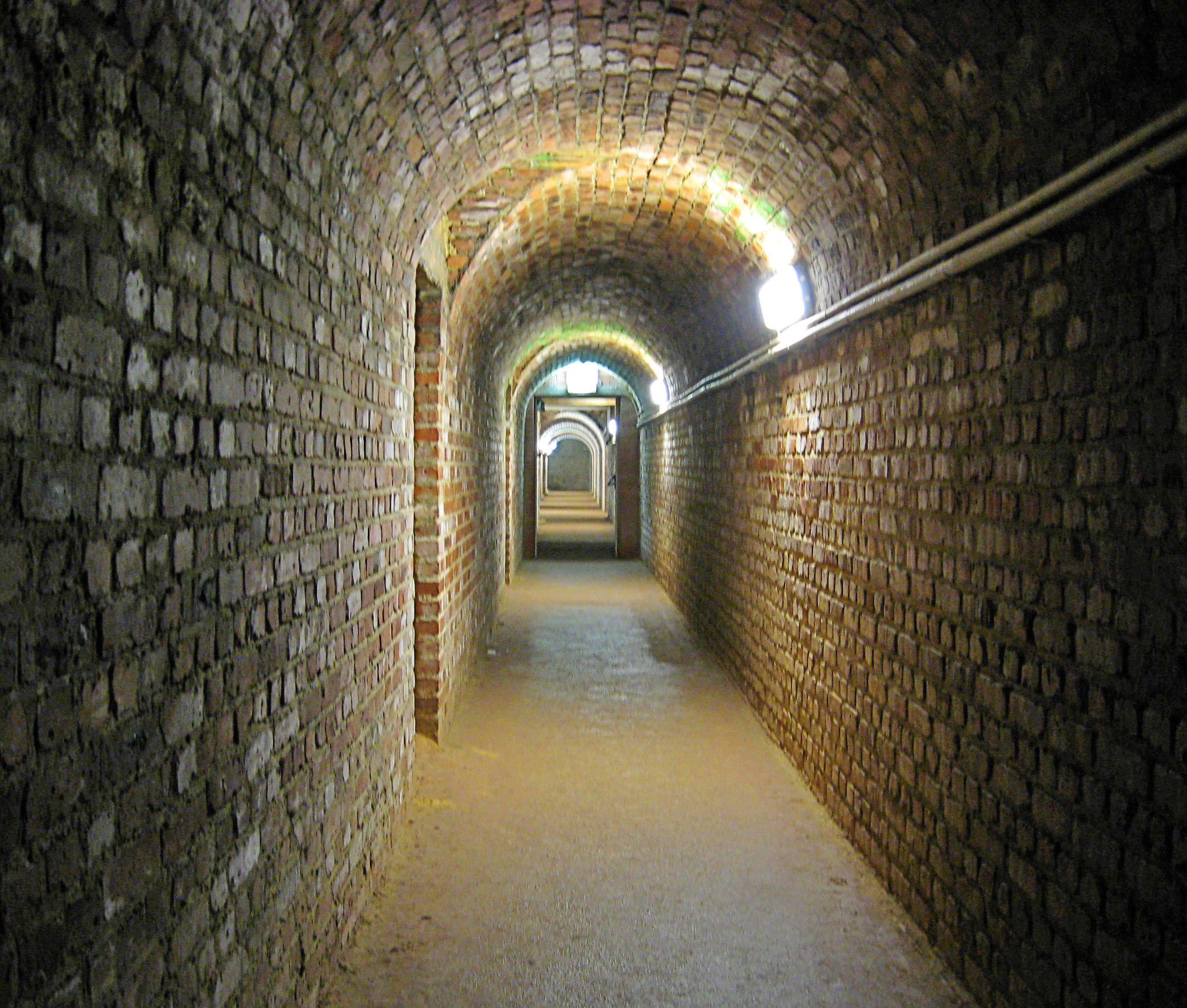 Gang im begonnenen, jedoch nicht fertiggestellten Regierungsbunker des Saarprotektorats in den Schlossberghöhlen aufgenommen am 11. September 2010